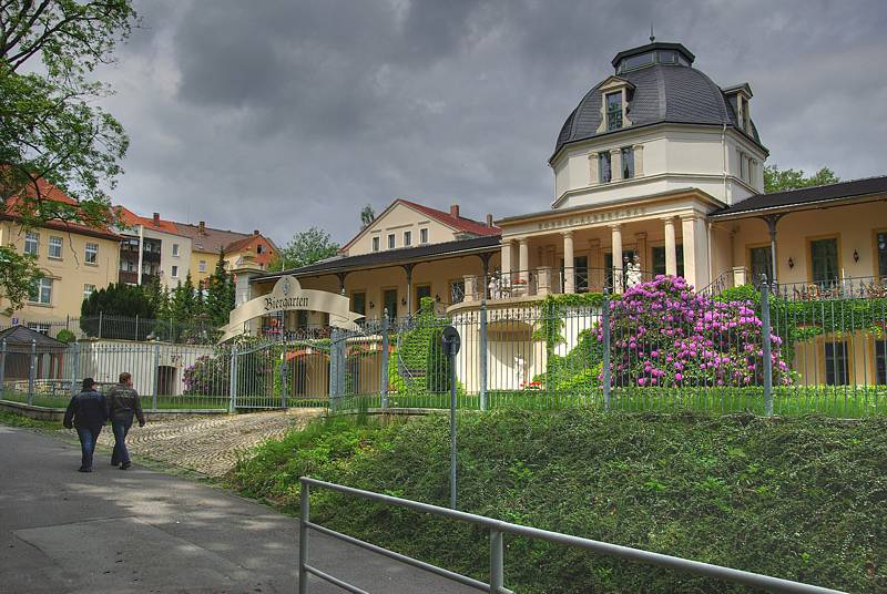 Koenig-Albert-Bad, Ansicht von der Brunnenstraße.